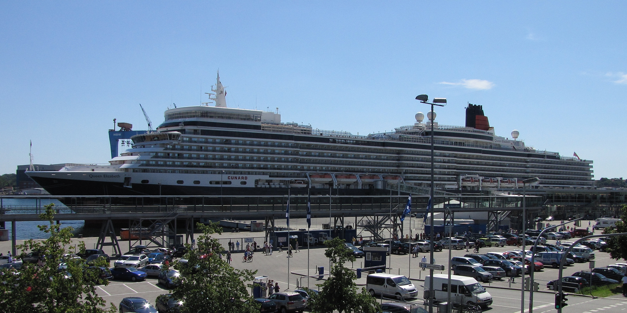 Kreuzfahrtschiff der Cunard-Reederei: Queen Elizabeth erstmals in Kiel festgemacht am Ostseekai am 24.07.2012 Foto Wolfgang Pehlemann Steinberg-Ostsee Germany